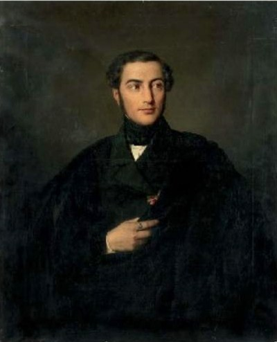 Альберт Катеринович Кавос (1800—1864), русский архитектор итальянского происхождения/